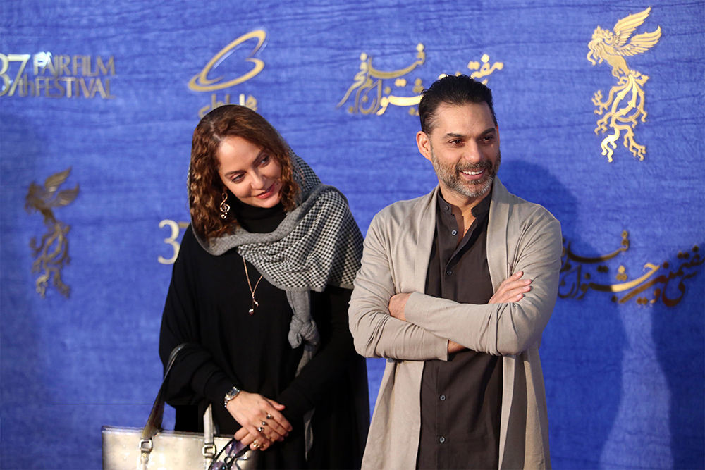 پیمان معادی و مهناز افشار در نشست خبری فیلم ناگهان درخت، سی و هفتمین دوره جشنواره فیلم فجر